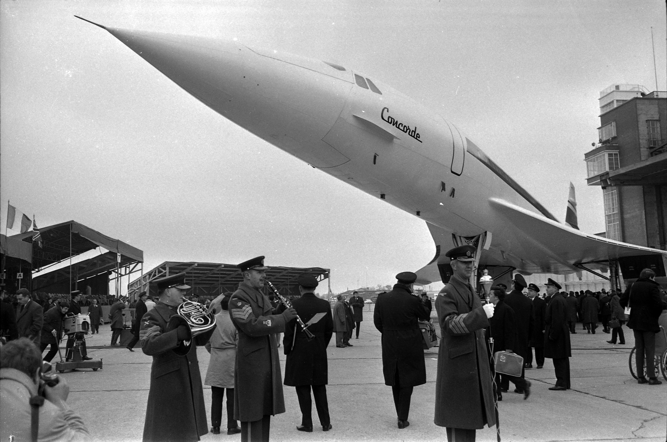 Ateliers Sud Aviation (Saint-Martin-du-Touch). 11 décembre 1967. Vue d'ensemble fanfare militaire jouant au pied du Concorde ; en arrière-plan vue en contre-plongée du nez de l'avion. Cliché pris lors de la présentation officielle du prototype français du Concorde.